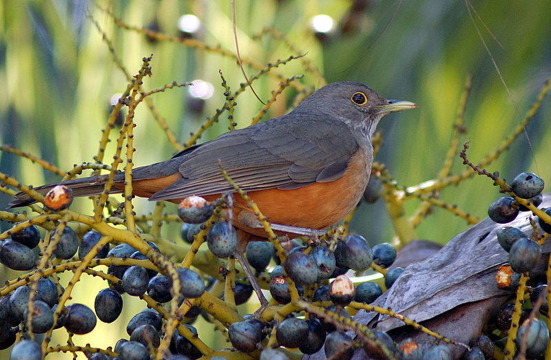 Parque da Independência, Museu do Ipiranga, São Paulo